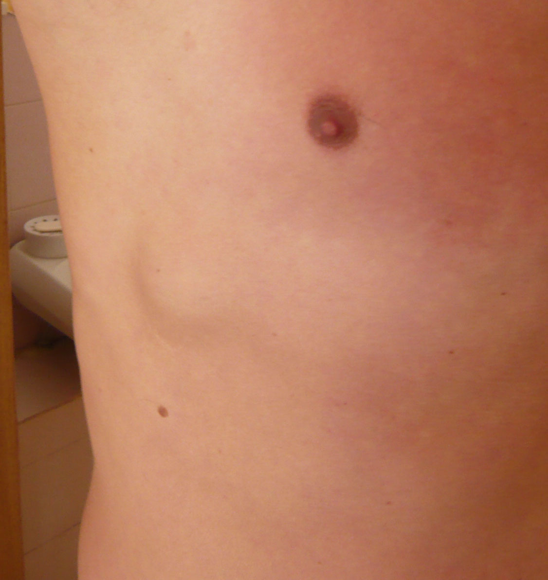 Межрёберная посттравматическая лёгочная грыжа - появление при кашле